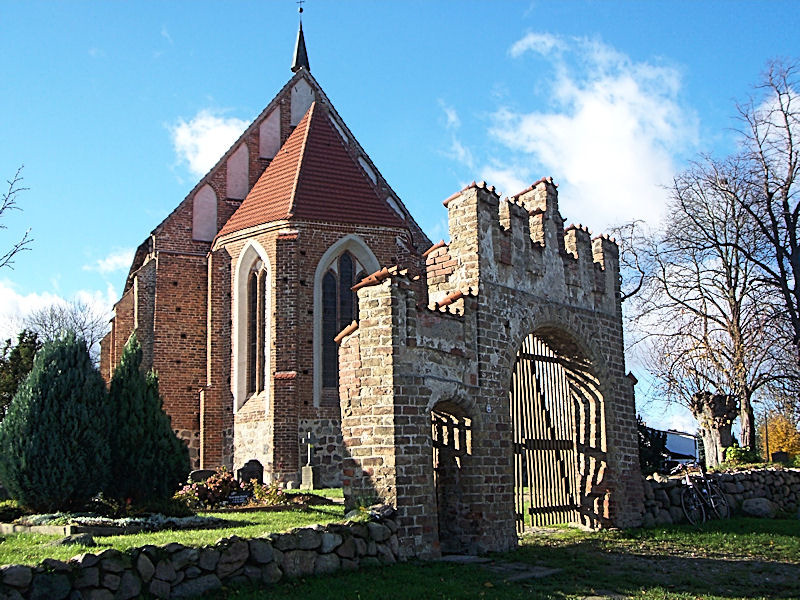 Kirche in Bentwisch, Mecklenburg-Vorpommern